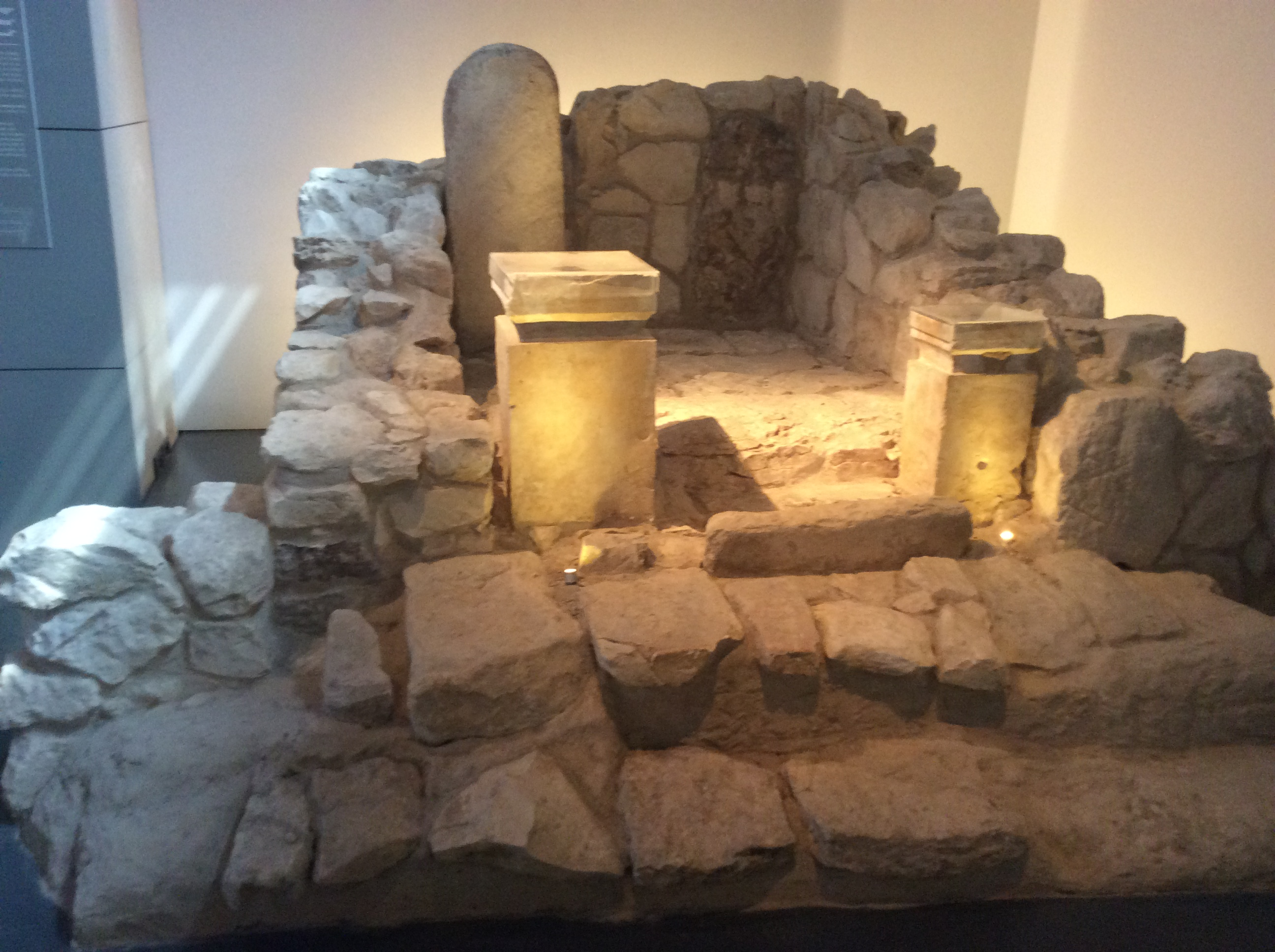 Partie centrale du seul sanctuaire du Royaume de Juda retrouvé, 8ème siècle avant JC, Tel Arad (Neguev), Musée d'Israël